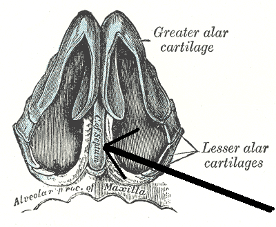 Módosítva